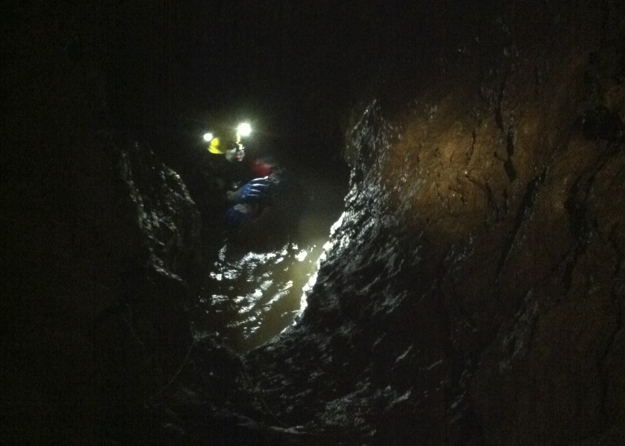 Höhlentaucher unmittelbar nach dem Einstig in den "Stillen See" der Kluterthöhle. Gut ist zu erkennen, dass aufgewirbelter Lehm im Wasser die Sicht bereits stark reduziert hat.